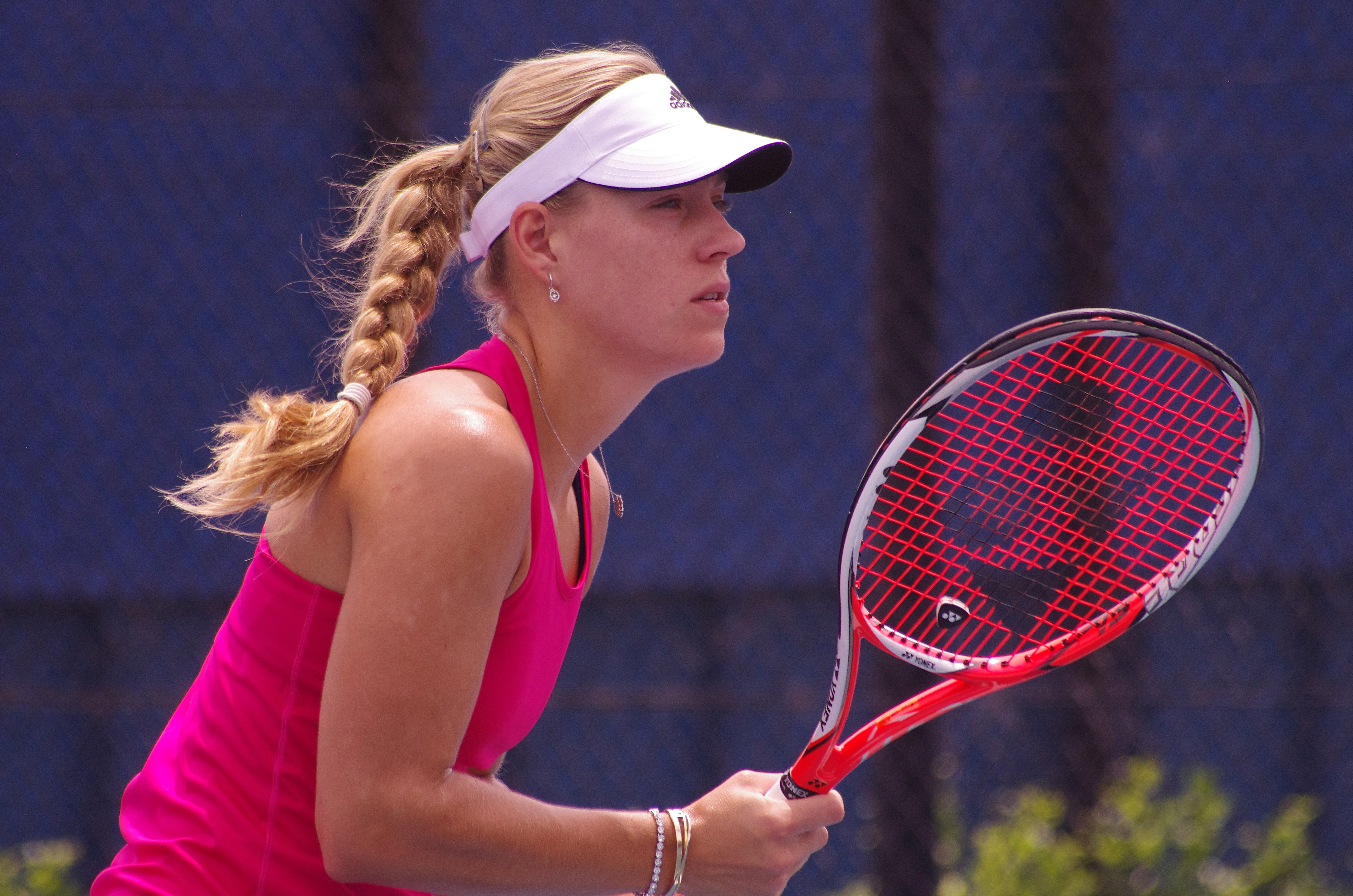 ANGELIQUE KERBER